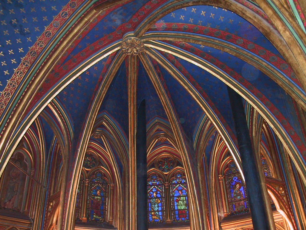 Sainte-Chapelle - Chapelle basse à Paris